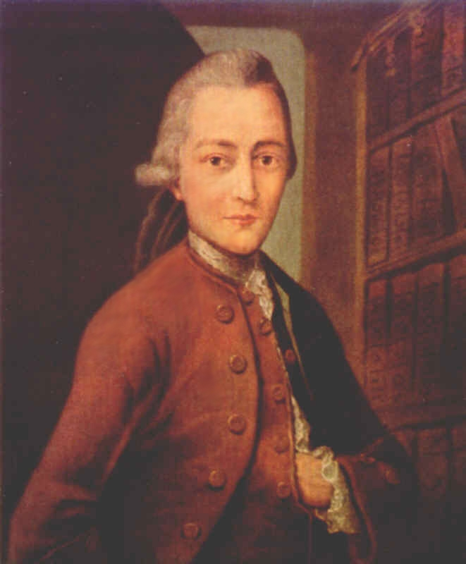 Johann Wolfgang Goethe 1765, vor seiner Abreise nach Leipzig Ölgemälde von Anton Johann Kern. Das Original befand sich in der Universität Leipzig, wo es 1943 verbrannte.